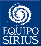 Logo de la Editorial Equipo Sirius, realizada por el usuario